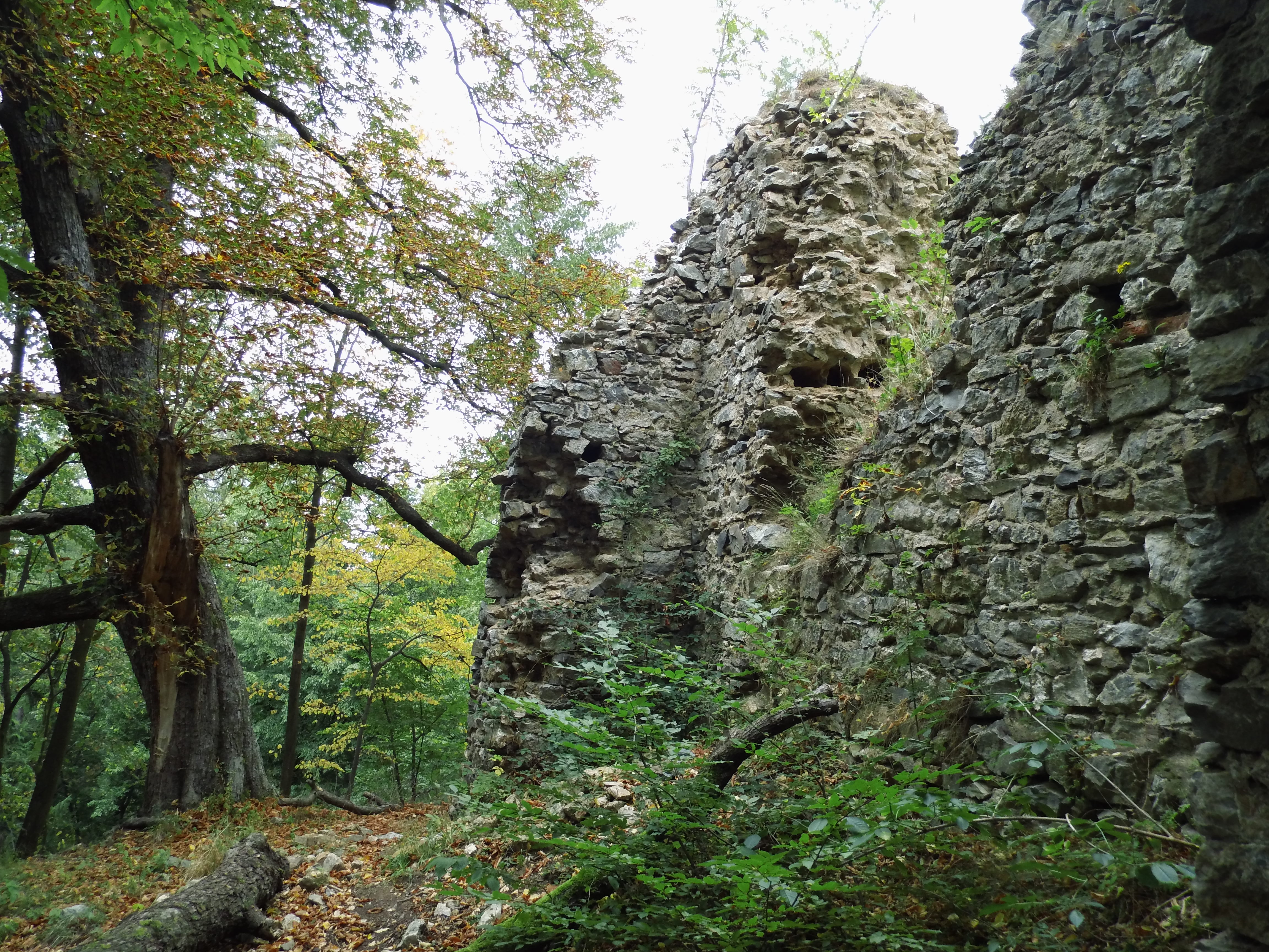 stěny hradu